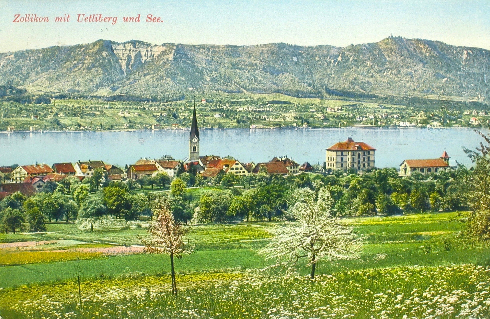 Zollikon vor 1922, Blick von der Allmend. Rechts das Sekundarschulhaus mit Turnhalle